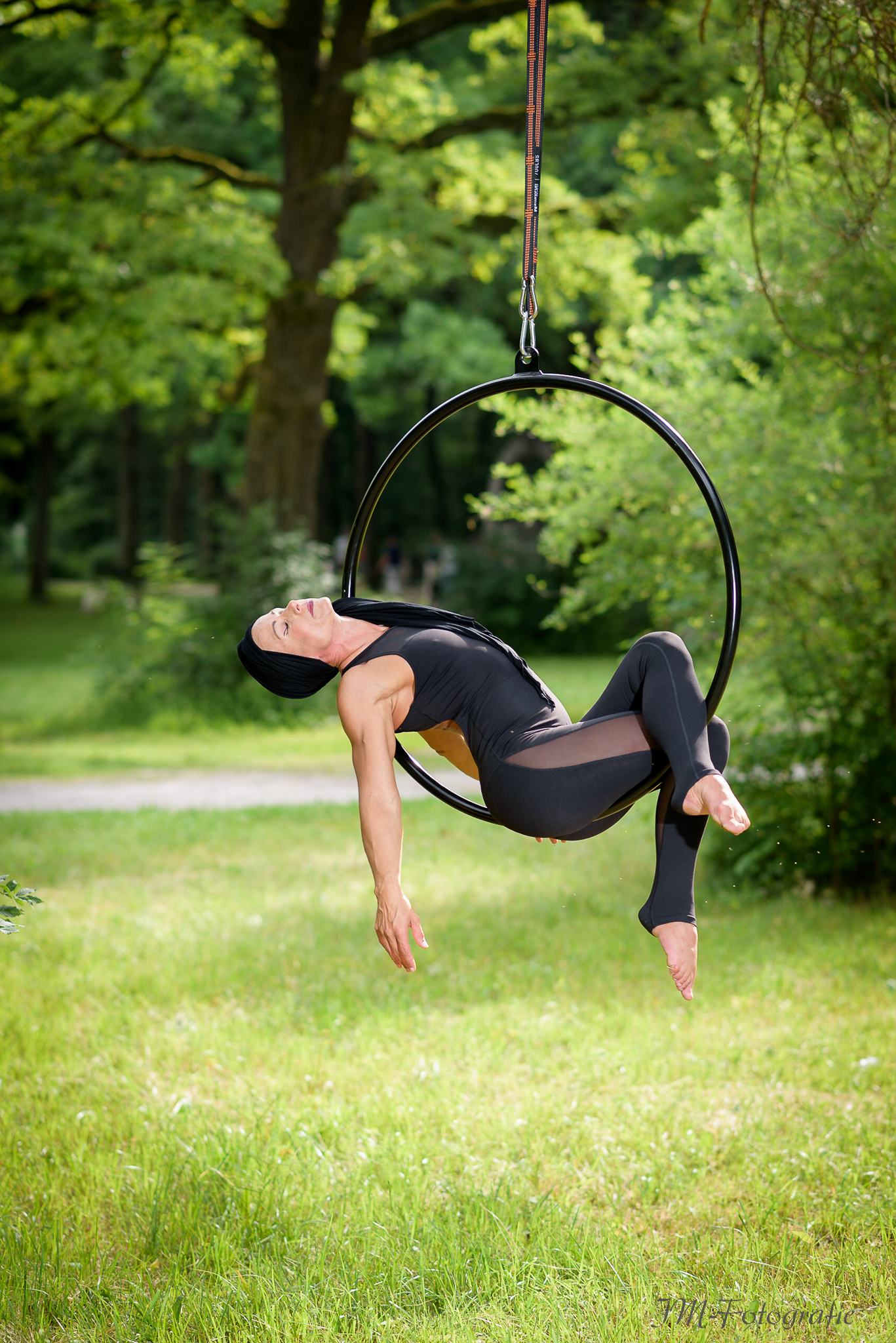 Aerial Hoop (auch Lyra) genannt bezeichnet einen Metallring, der frei in der Luft hängt.